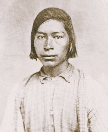 Chickasaw Man